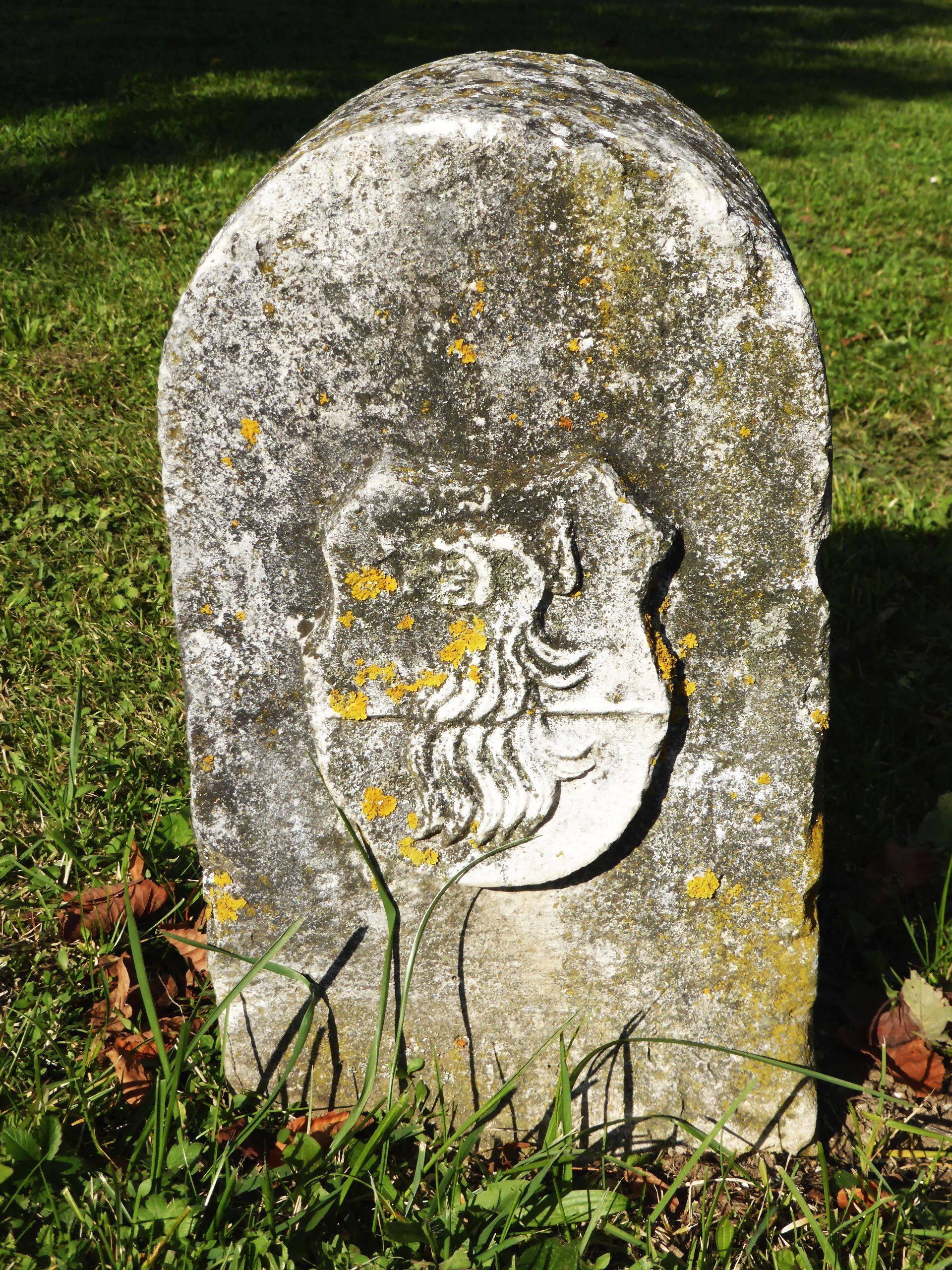 Angeblich das Wappen des Wolf von Schönleiten auf einem Markstein in der Gemeinde Wolfsegg, ist aber das Wappen der Teuffel von Pirkensee